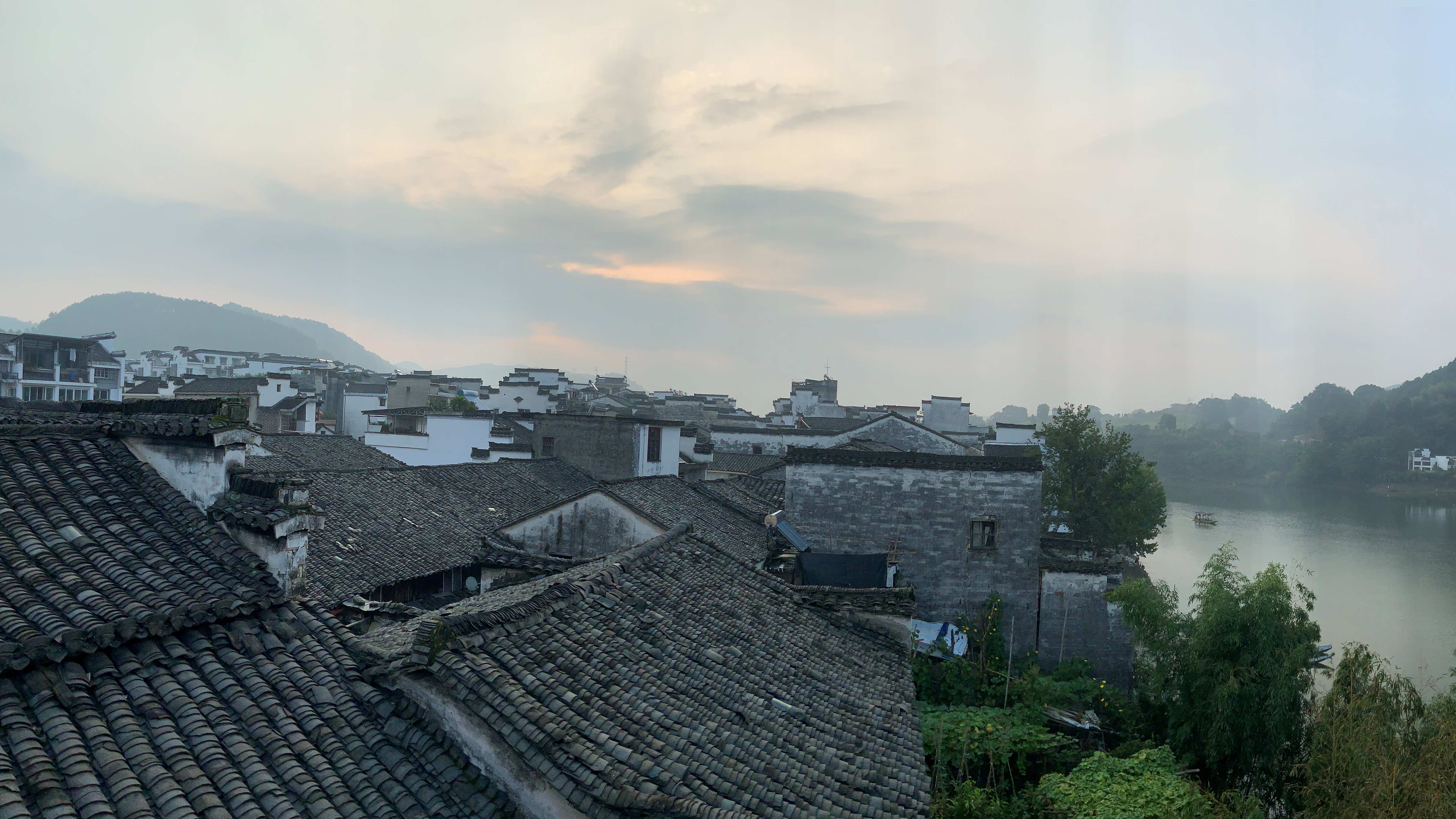 中文（中国大陆）: 黄山市歙县渔梁村